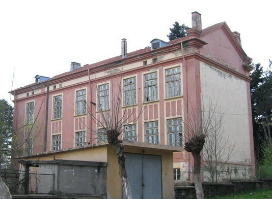 Сградата на бившето Климатично училище на село Славяново, Поповско, построена през 1925 год.